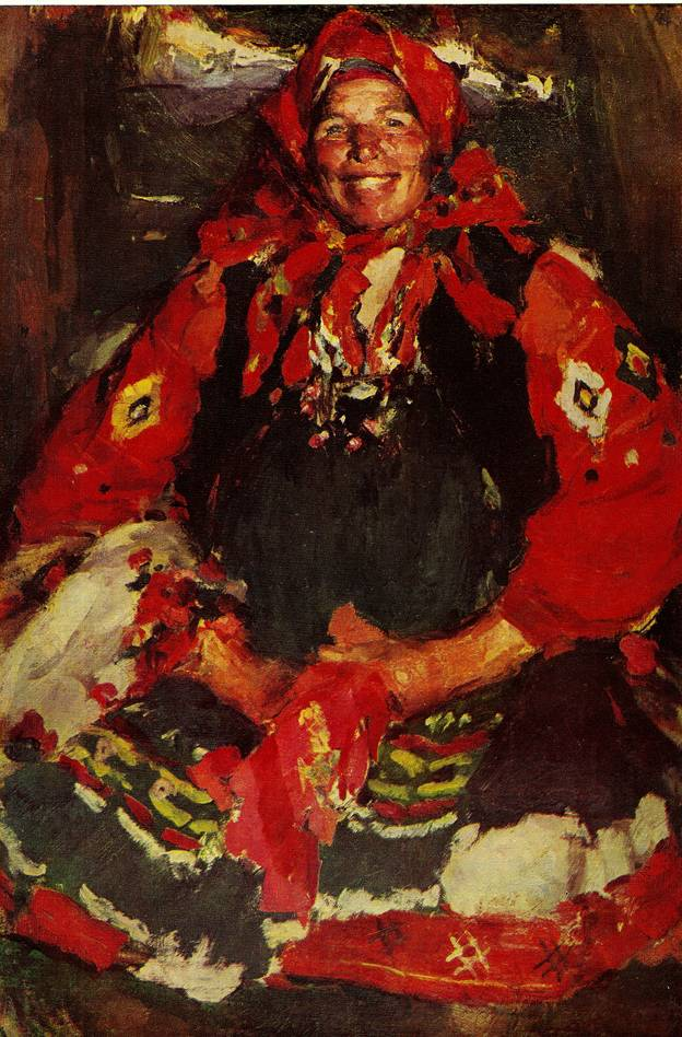 Arkhipov: Parasztasszony zöld kötényben